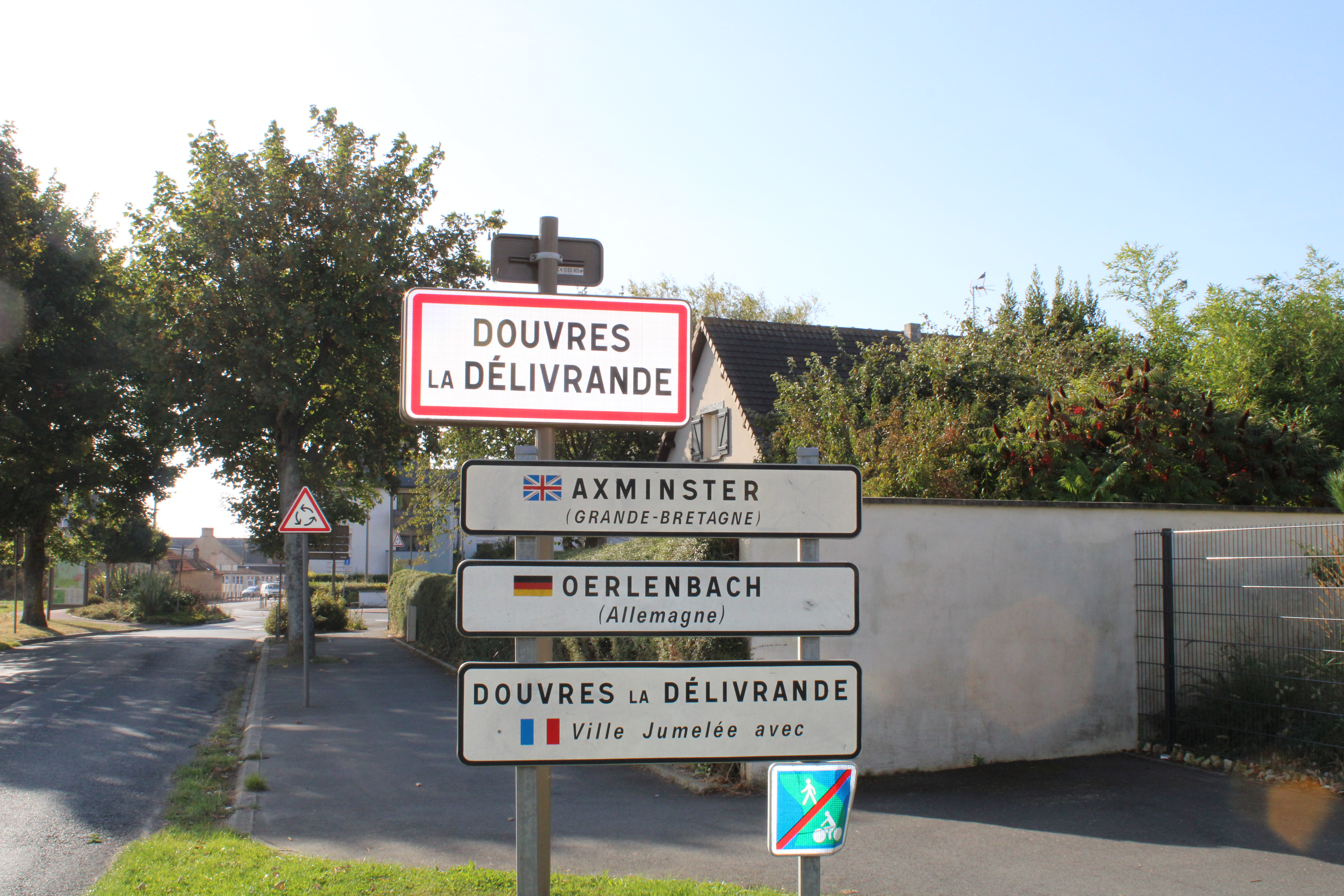 Entrée du bourg